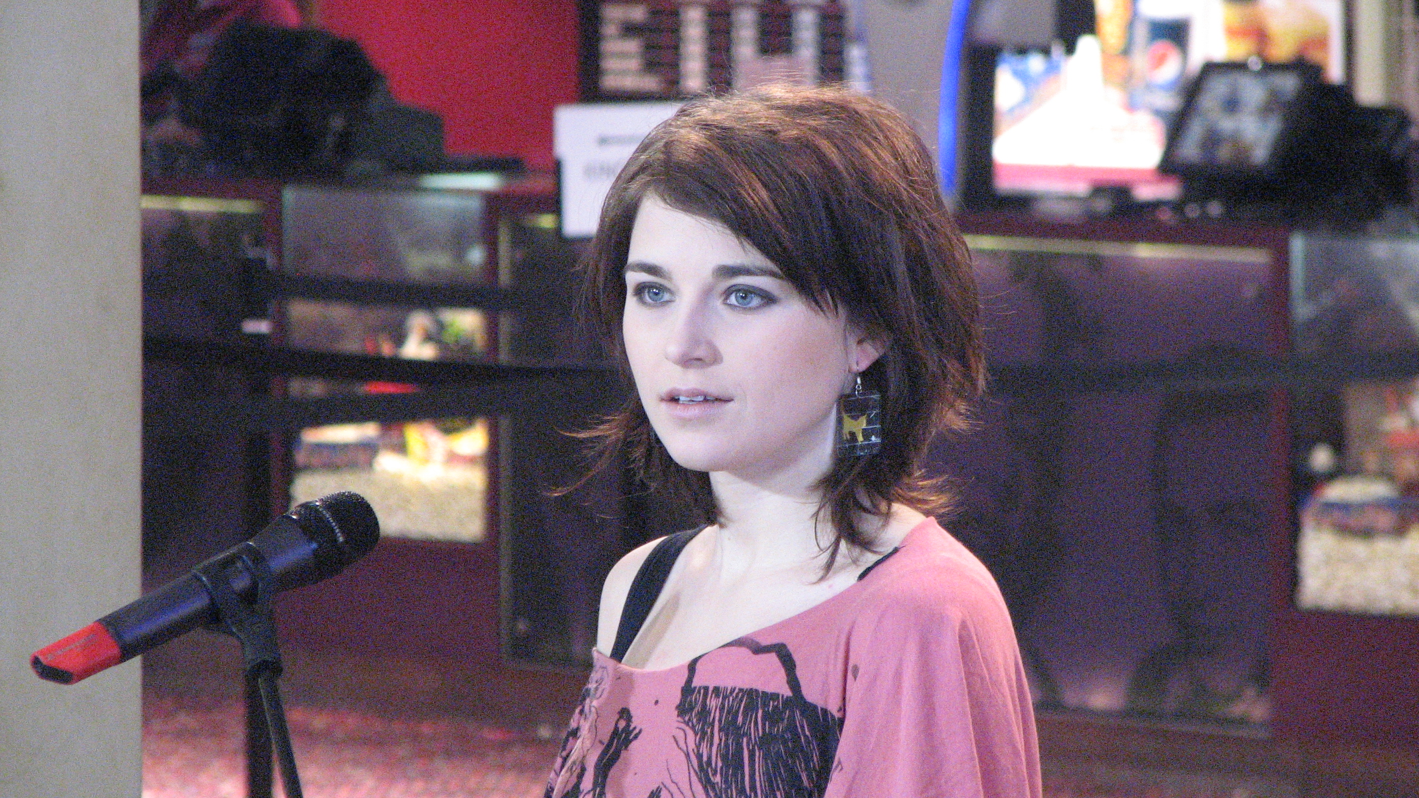 Kene Vernik "Ringvaate Eesti Laulu" salvestusel